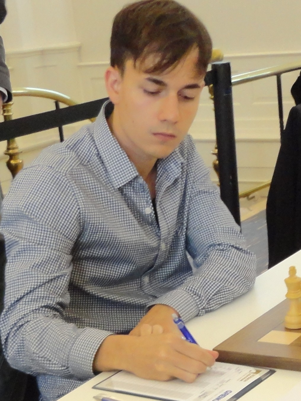 Sebastian Bogner, Deutsche Schachbundesliga Saison 2015/16, Runde 12 in Baden-Baden.